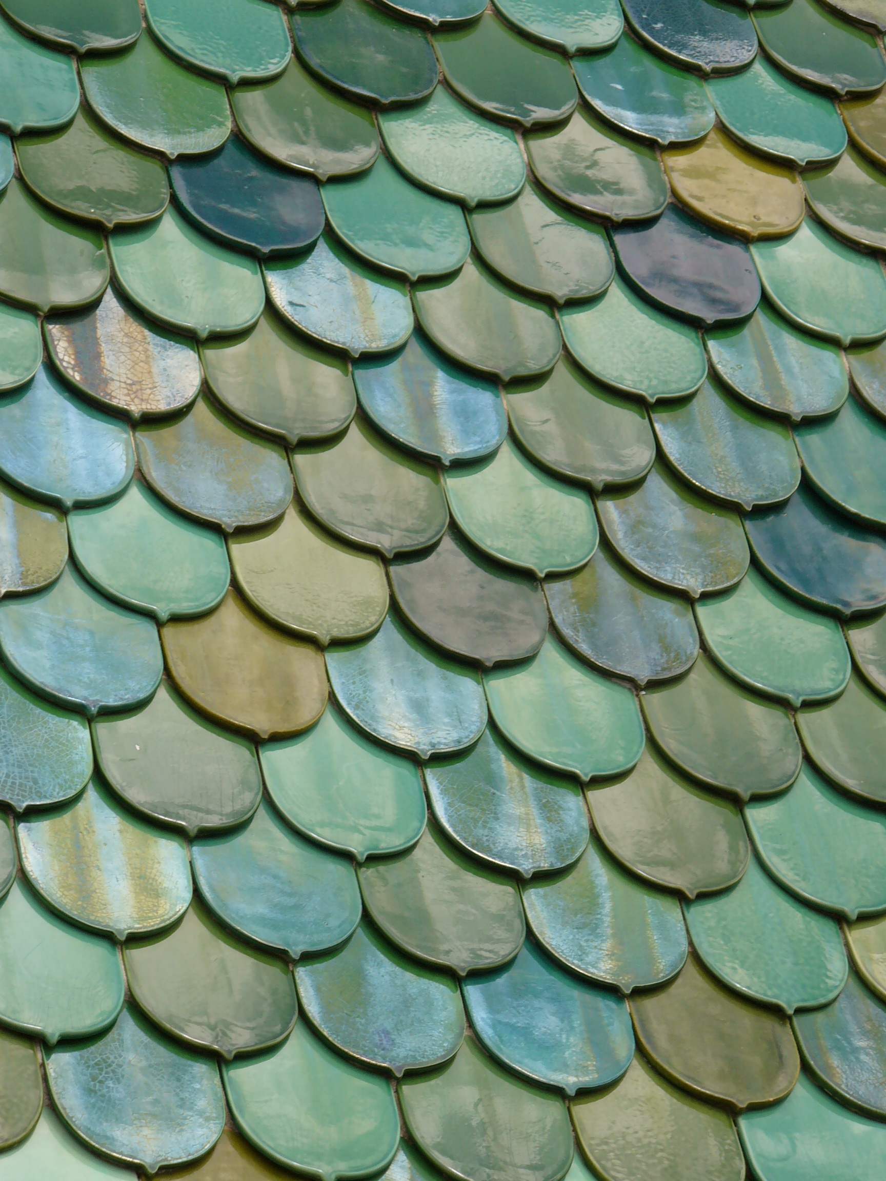 Grüner Ziegel (Dach einer Burg in Portugal)